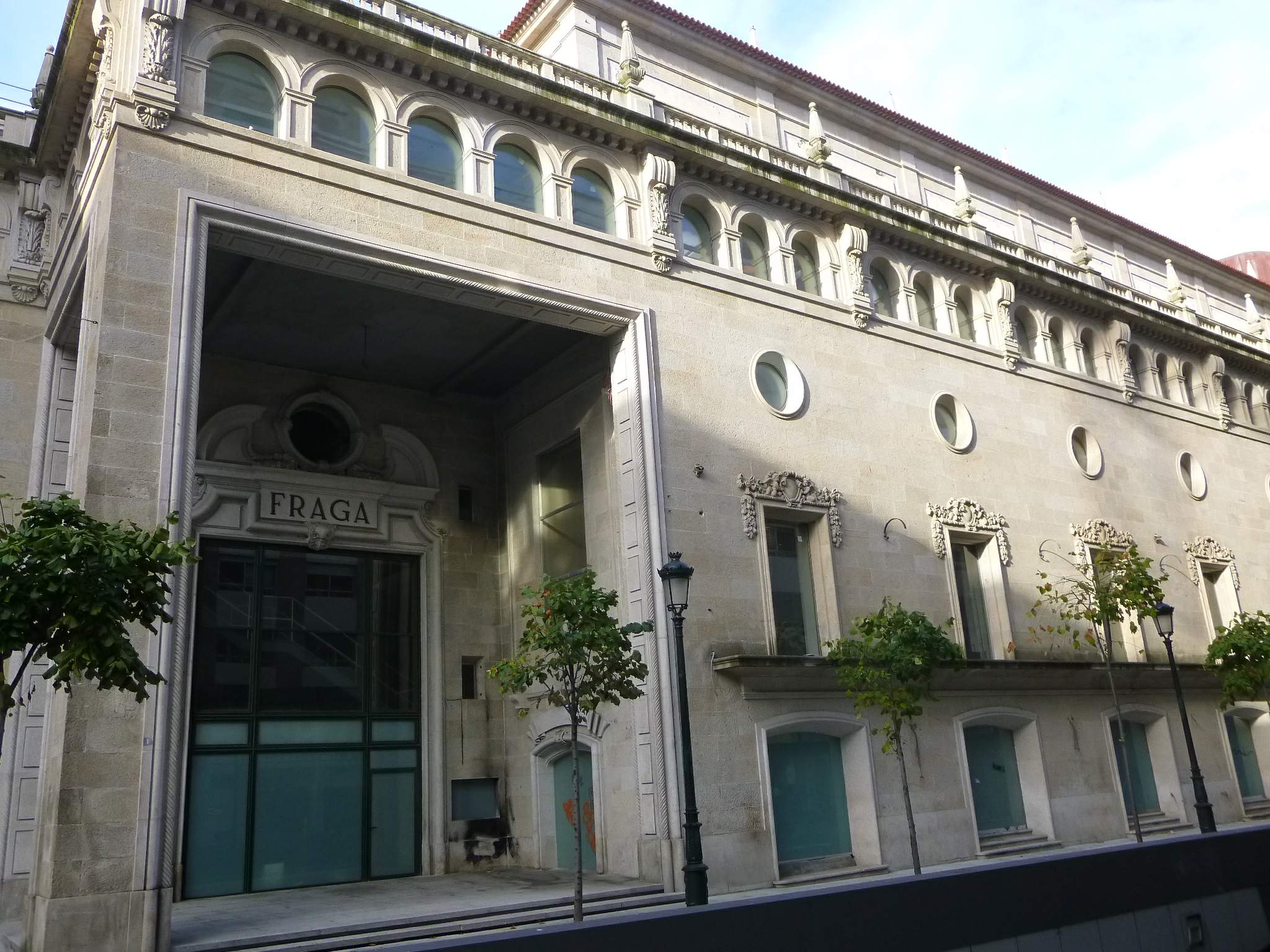 Vigo - Teatro-Cine Fraga